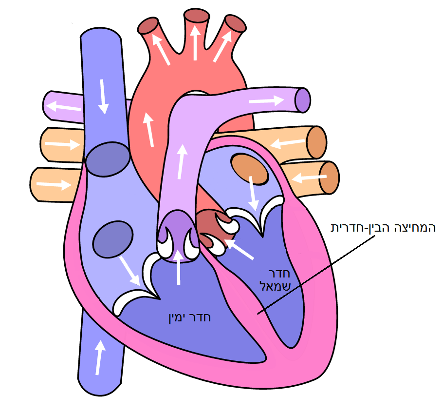 המחיצה הבין חדרית